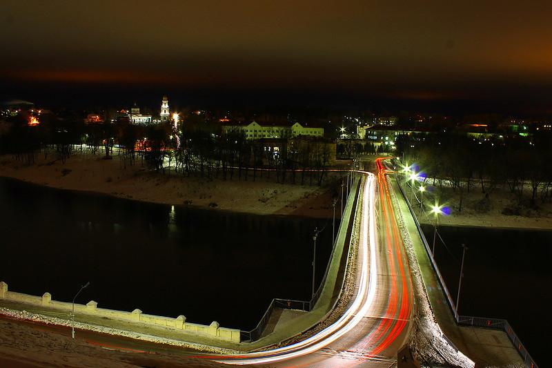 Старый мост во Ржеве